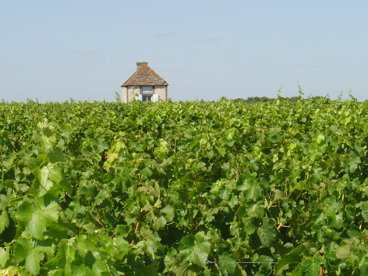 Vignobe et Loge de vigne à Pocé-sur-Cisse Indre et Loire France